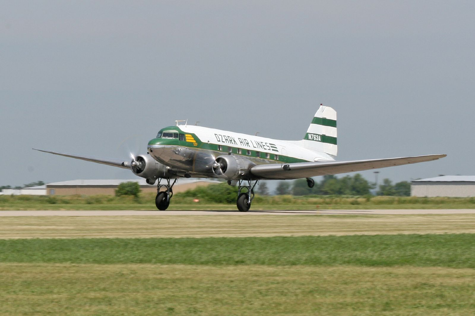 DC3 - Ozark Airlines